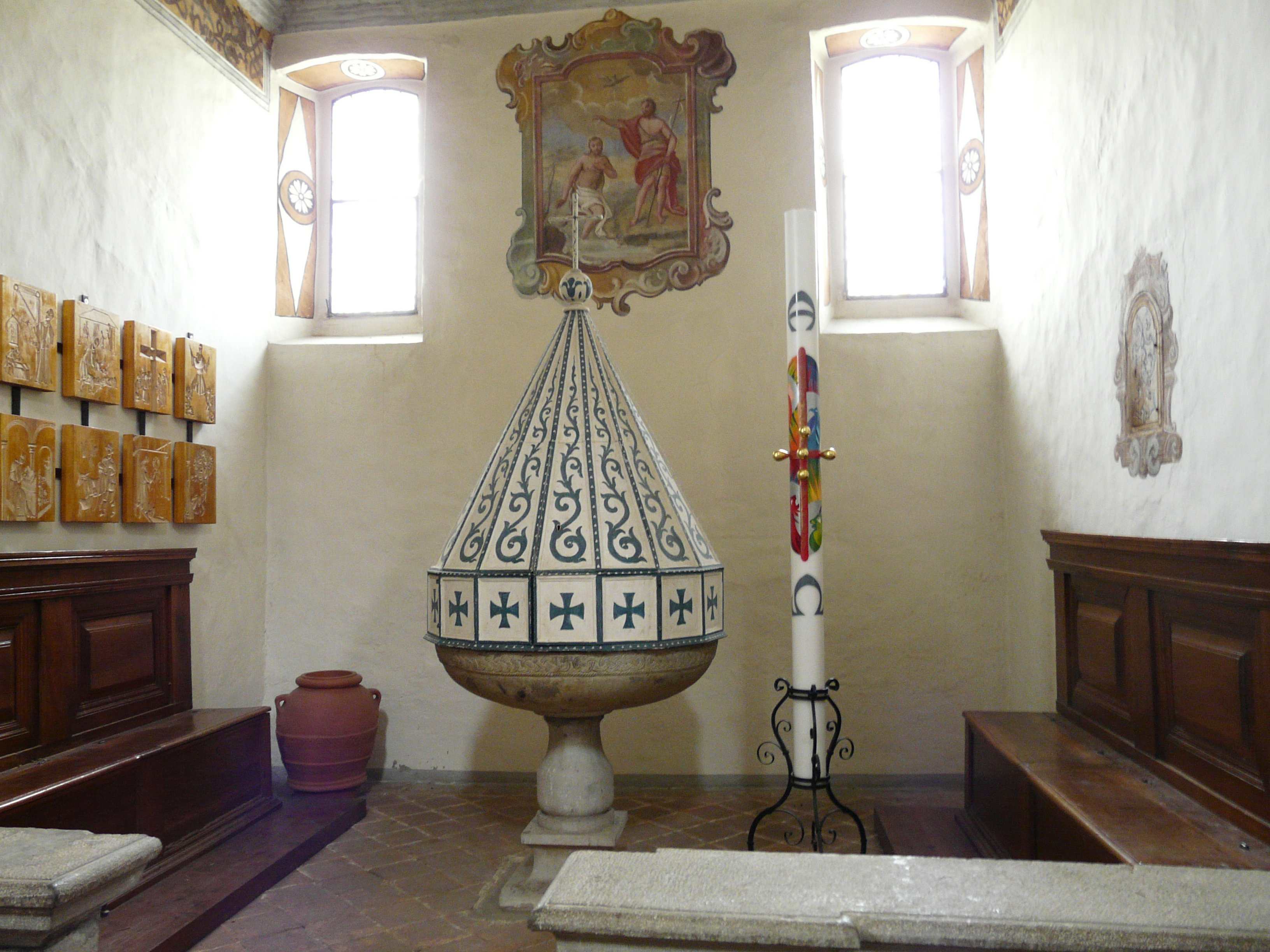 Immagini dell'abbazia di San Colombano di Bobbio, Emilia-Romagna, Italia